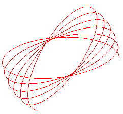 schema pendule spherique 3 r ferreol